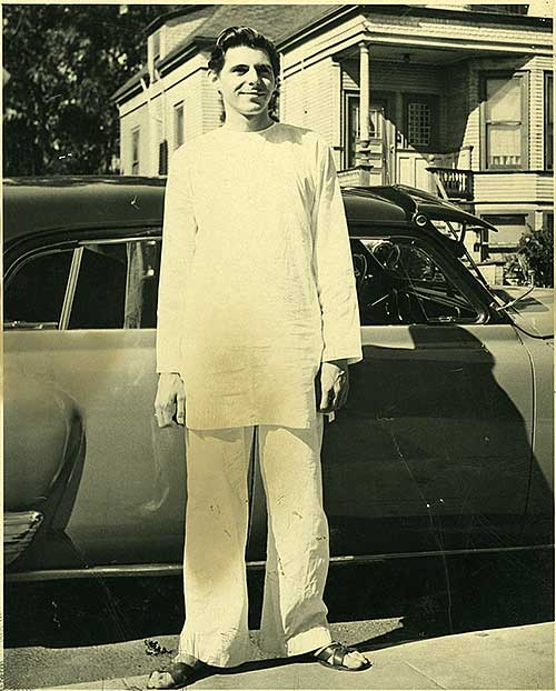 Satguru Sivaya Subramuniyaswami (Gurudeva) in 1949, after returning from Sri Lanka